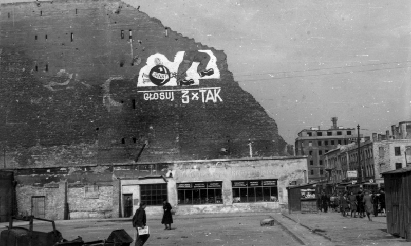 27 IV 1946 Krajowa Rada Narodowa uchwaliła ustawę o Referendum Ludowym, wyznaczając datę jego odbycia na 30 VI 1946. Referendum było swoistą próbą generalną przed wyborami parlamentarnymi, które odsunięto w czasie, miało wykazać jedność narodu i zaufanie do rządzących. Przed społeczeństwem postawiono trzy oczywiste w świetle doświadczeń historycznych pytania: 1. Czy jesteś za zniesieniem Senatu? 2. Czy chcesz utrwalenia w przyszłej konstytucji ustroju gospodarczego przez reformę rolną i unarodowienie podstawowych gałęzi gospodarki narodowej z zachowaniem podstawowych uprawnień inicjatywy prywatnej? 3. Czy chcesz utrwalenia zachodnich granic państwa polskiego na Bałtyku, Odrze i Nysie Łużyckiej? Ugrupowania rządzące - PPR, PPS, SL i SD – prowadziły szeroką akcję propagandową na rzecz głosowania “3 x tak”. Napisy tej treści pojawiły się w najbardziej eksponowanych miejscach we wsiach, osiedlach i miastach. Partie i ugrupowania opozycyjne, zwłaszcza PSL, znalazły się w trudnej sytuacji. By zamanifestować siłę swego oddziaływania wezwały do głosowania na “nie”. PSL ograniczyło to wezwanie tylko do pierwszego pytania, choć partia tradycyjnie wypowiadała sie przeciwko senatowi. Oficjalne wyniki głosowania: W Referendum wzięło udział 91% uprawnionych. Na pierwsze pytanie pozytywnie (“tak”) odpowiedziało – 68% uprawnionych, na drugie pytania – “tak” odpowiedziało – 77%, na trzecie – “tak” odpowiedziało 91%. Historycy dotarli jednak do rzeczywistych rezultatów głosowania (zob. literatura). Przeciwko fałszerstwom protestowali: prezes PSL Stanisław Mikołajczyk i ambasadorzy USA i Wielkiej Brytanii. Władze oskarżyły Mikołajczyka o zdradę interesów kraju, a USA i Wielką Brytanię o mieszanie się w wewnętrzne sprawy Polski. Opis zewnętrzny: fotografie czarno-białe, format 13x18 cm Miejsce przechowywania: Archiwum Dokumentacji Mechanicznej, Zespół: Archiwum Fotograficzne Stefana Rassalskiego. Autor komentarza: Urszula Wieczorek Autor fotografii: Stefan Rassalski